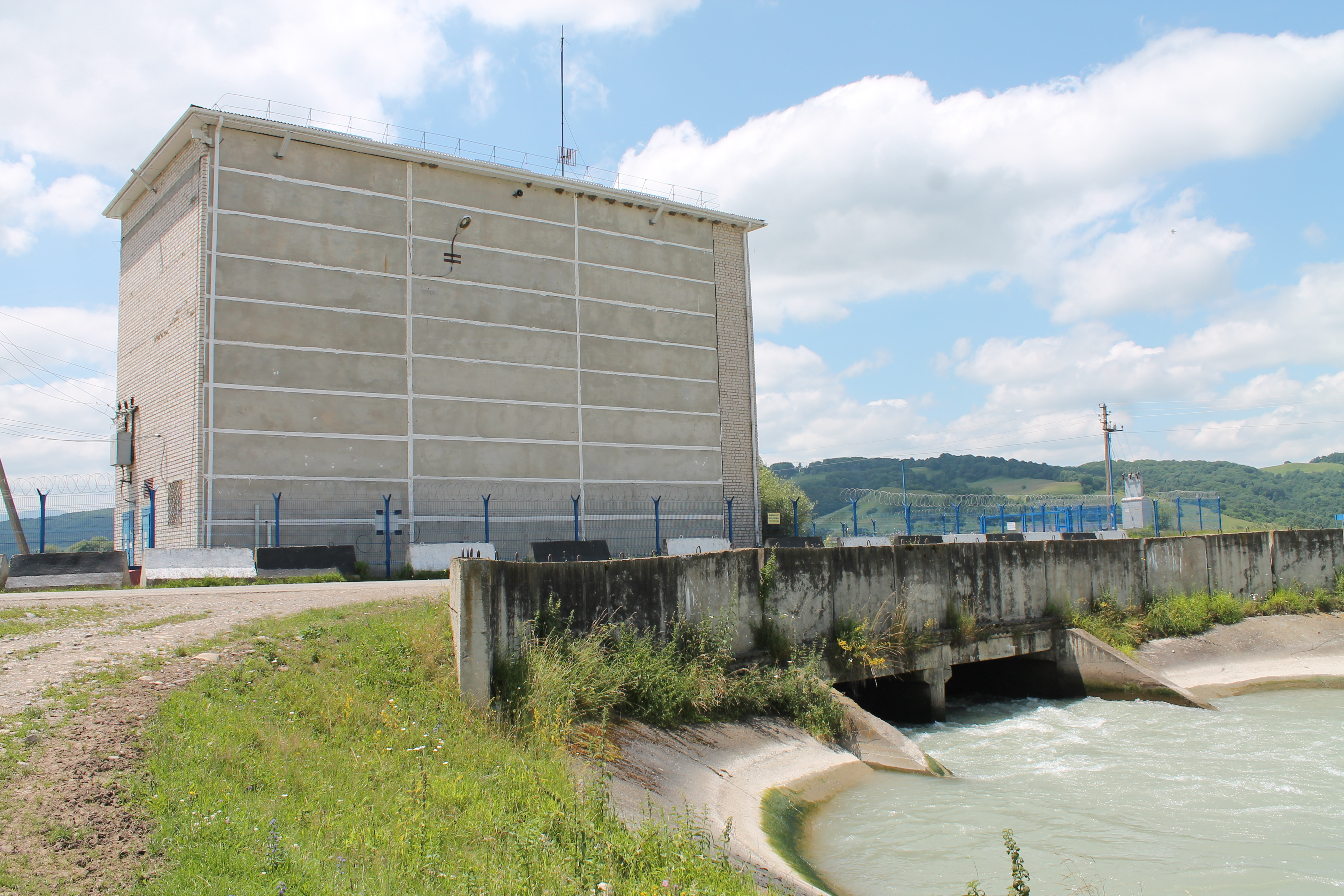 Аварийное перегораживающее сооружение Зеленчукской ГЭС-ГАЭС